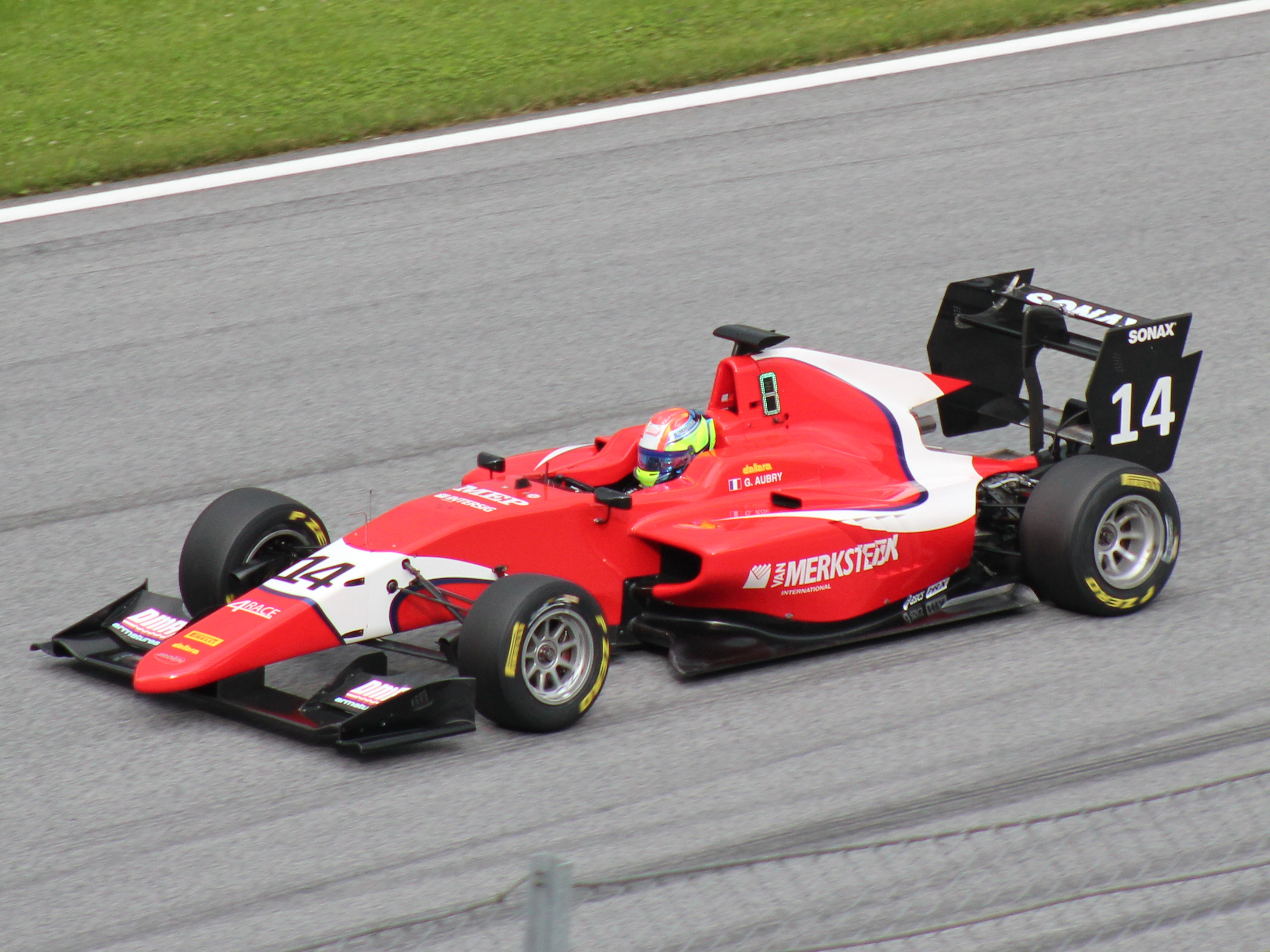 14 Gabriel Aubry beim Rennwochenende in Österreich 2018